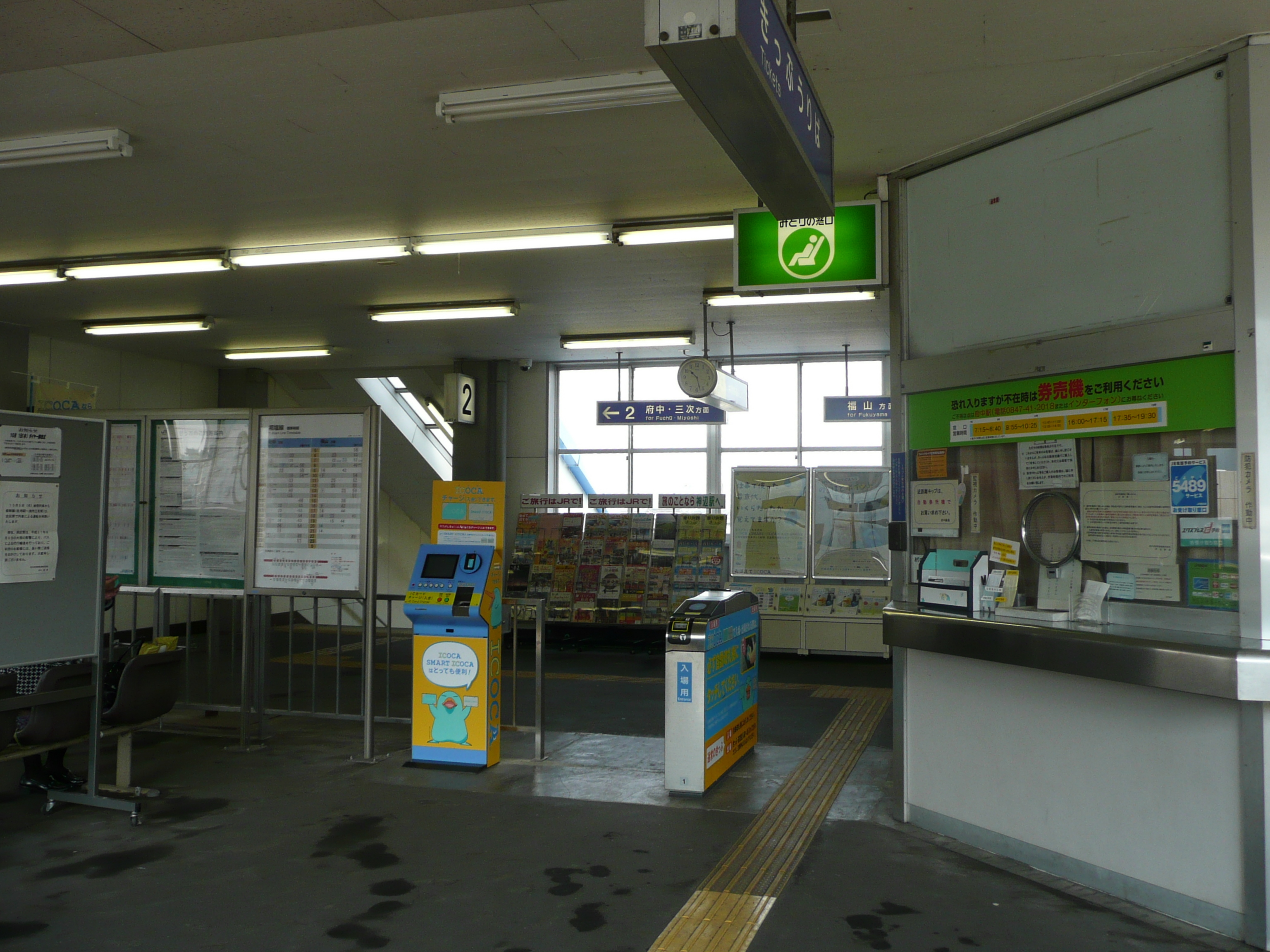 JR神辺駅の改札口